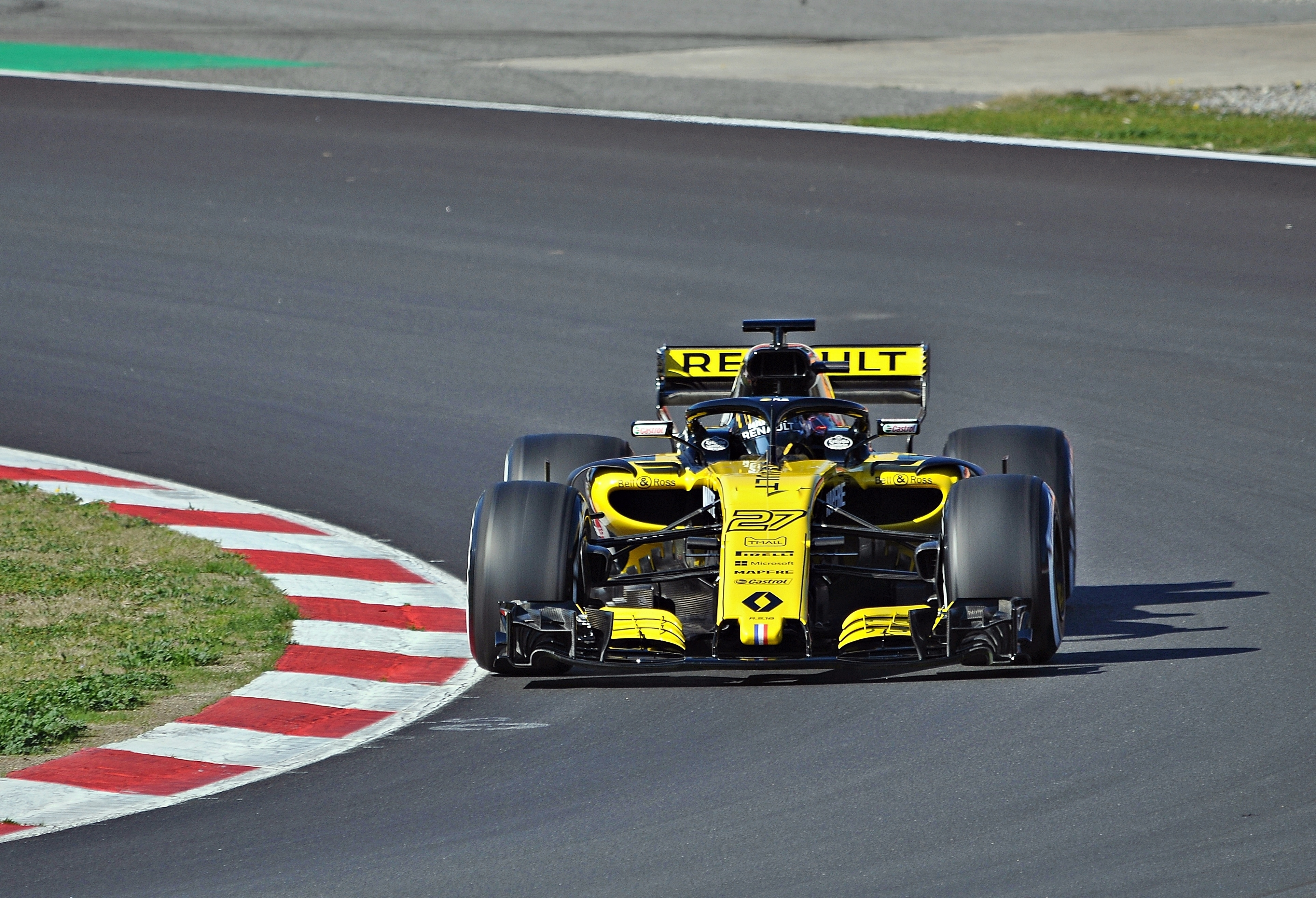 Renault RS18